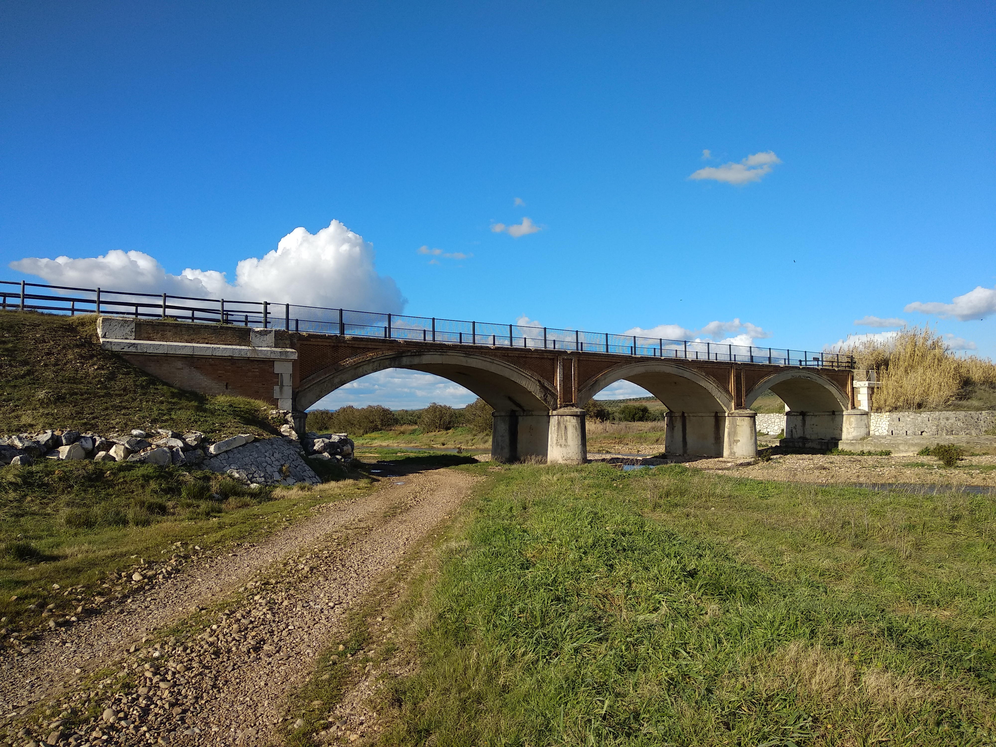 Puente sobre el Río Guadalmazán en la antigua línea Marchena-Valchillón en La Fuencubierta (Córdoba)